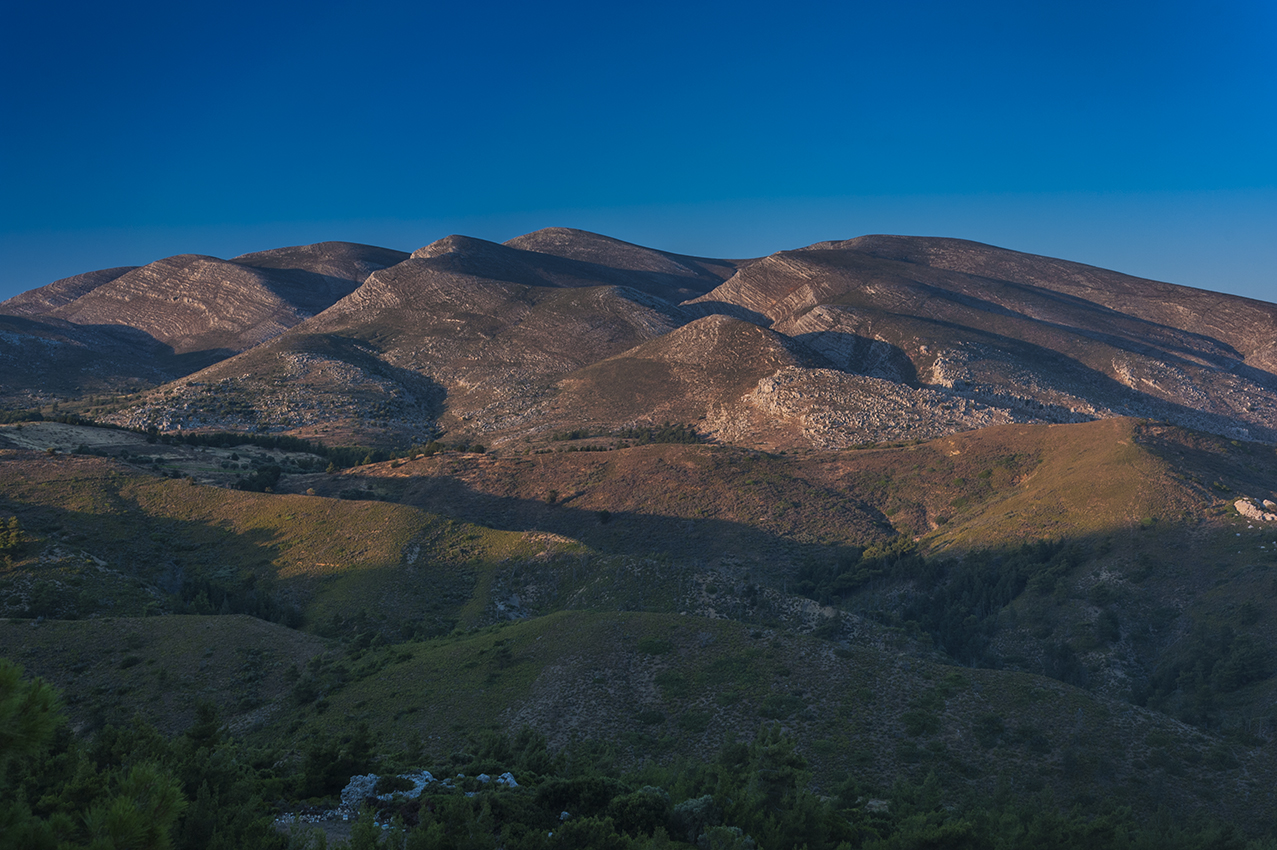 Mount-Attaviros-S-view